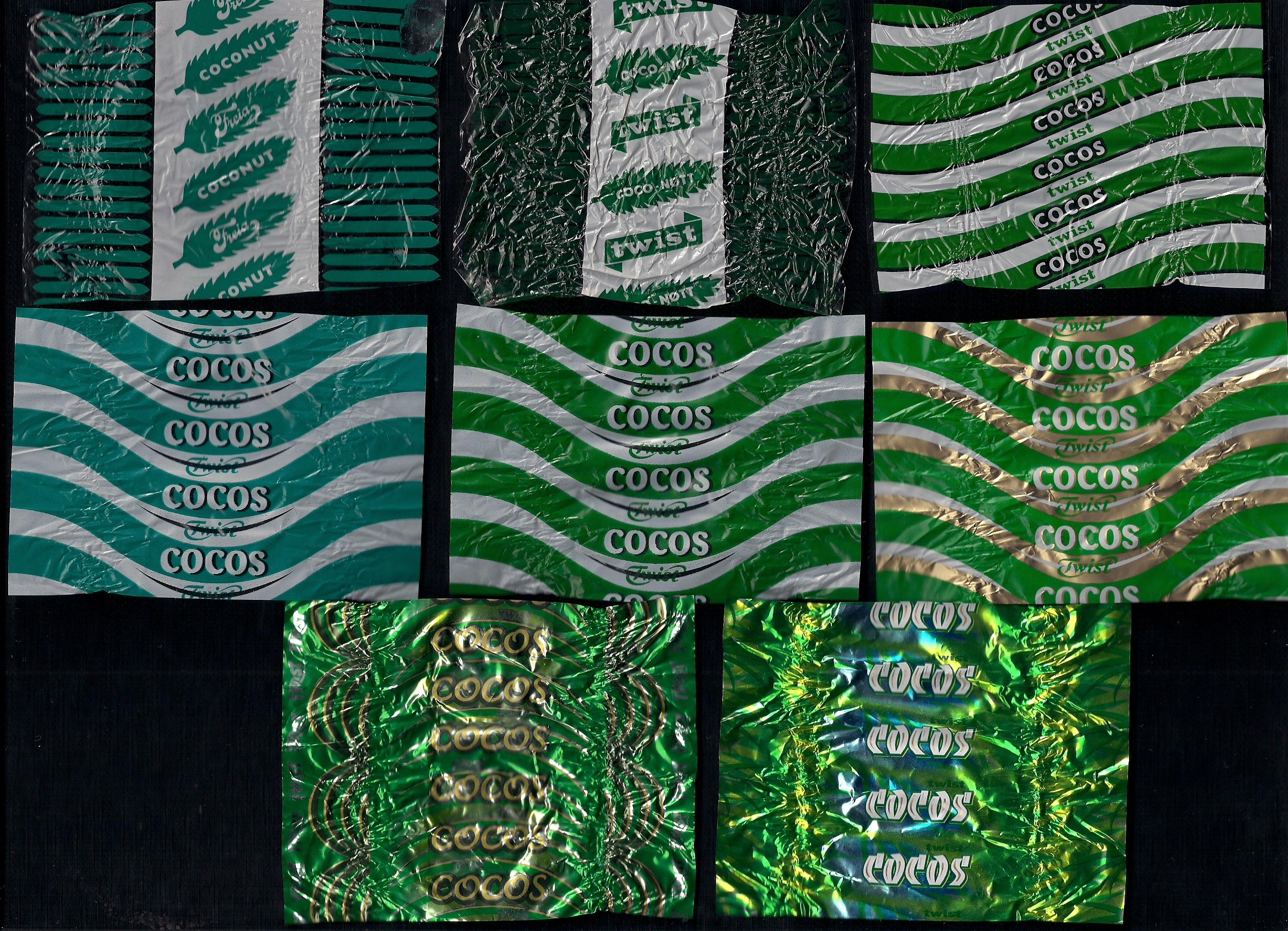 Åtte utgaver av cocostwist. De to første er hhv. Coconut fra 1960-tallet og coco-nøtt fra ca. 1990. Den nyeste er Cocos fra 2012.